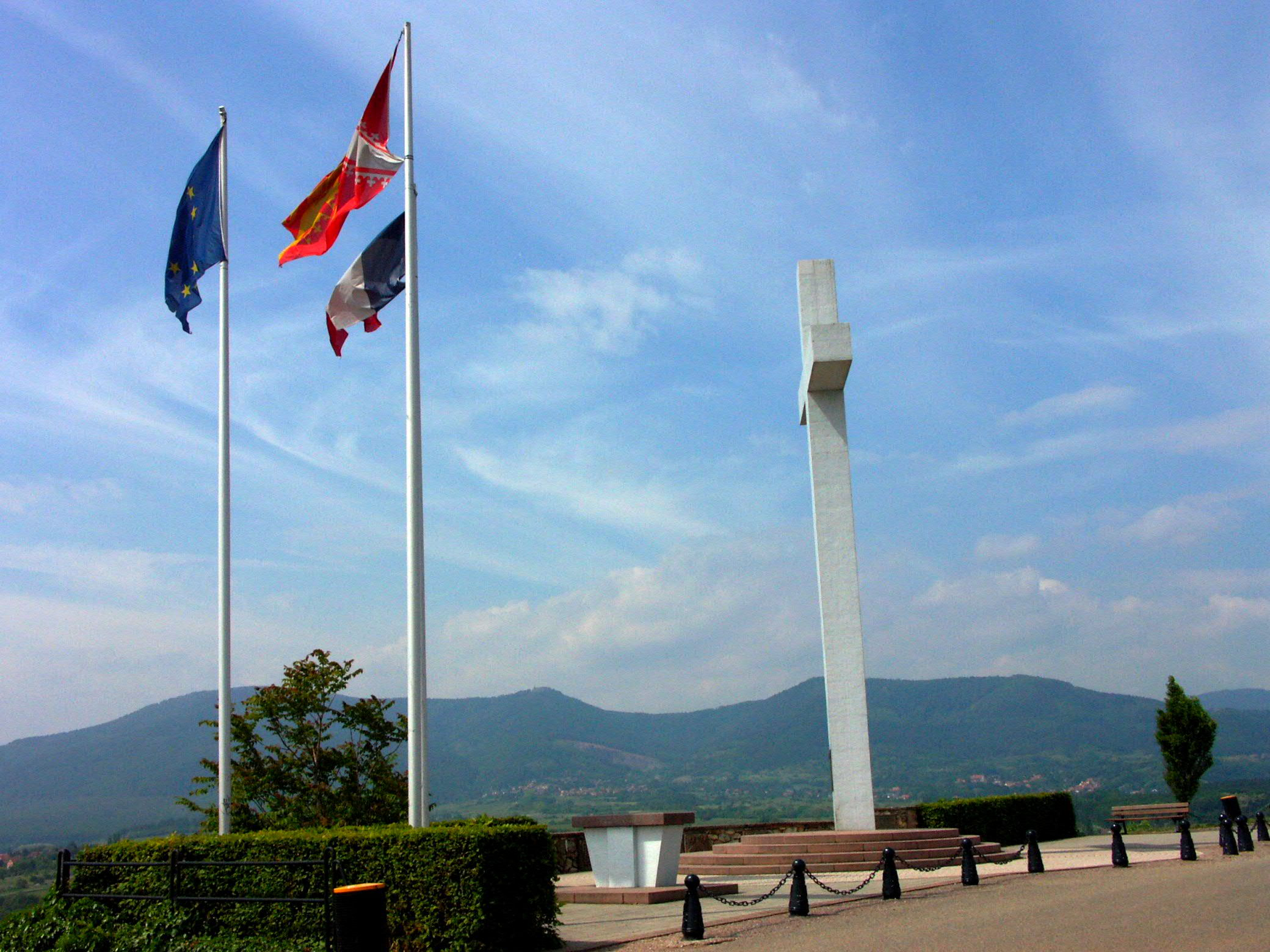 Obernai (Bas-Rhin) Monument MalgréNous